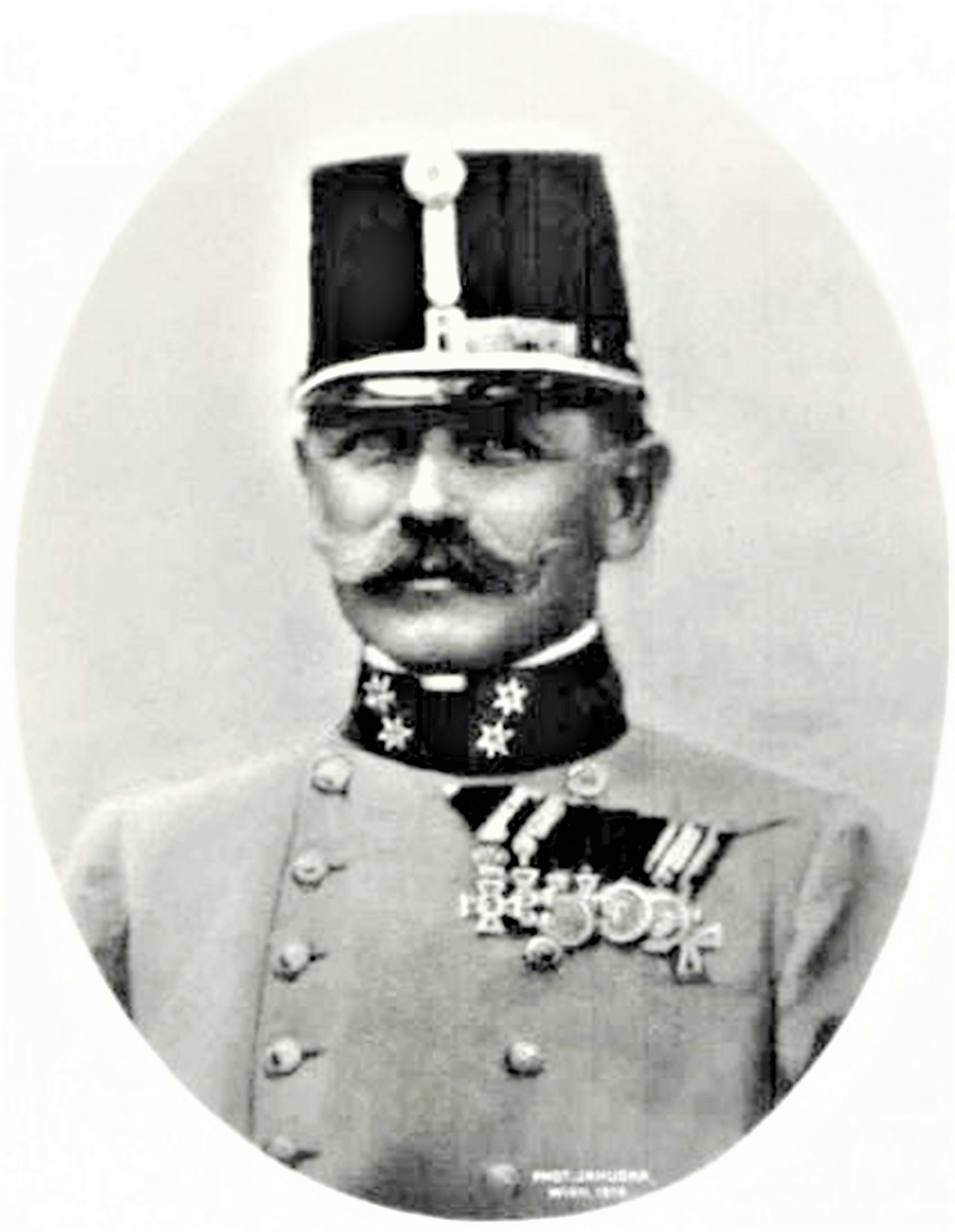 Hermann Kusmanek von Burgneustädten als FML 1911